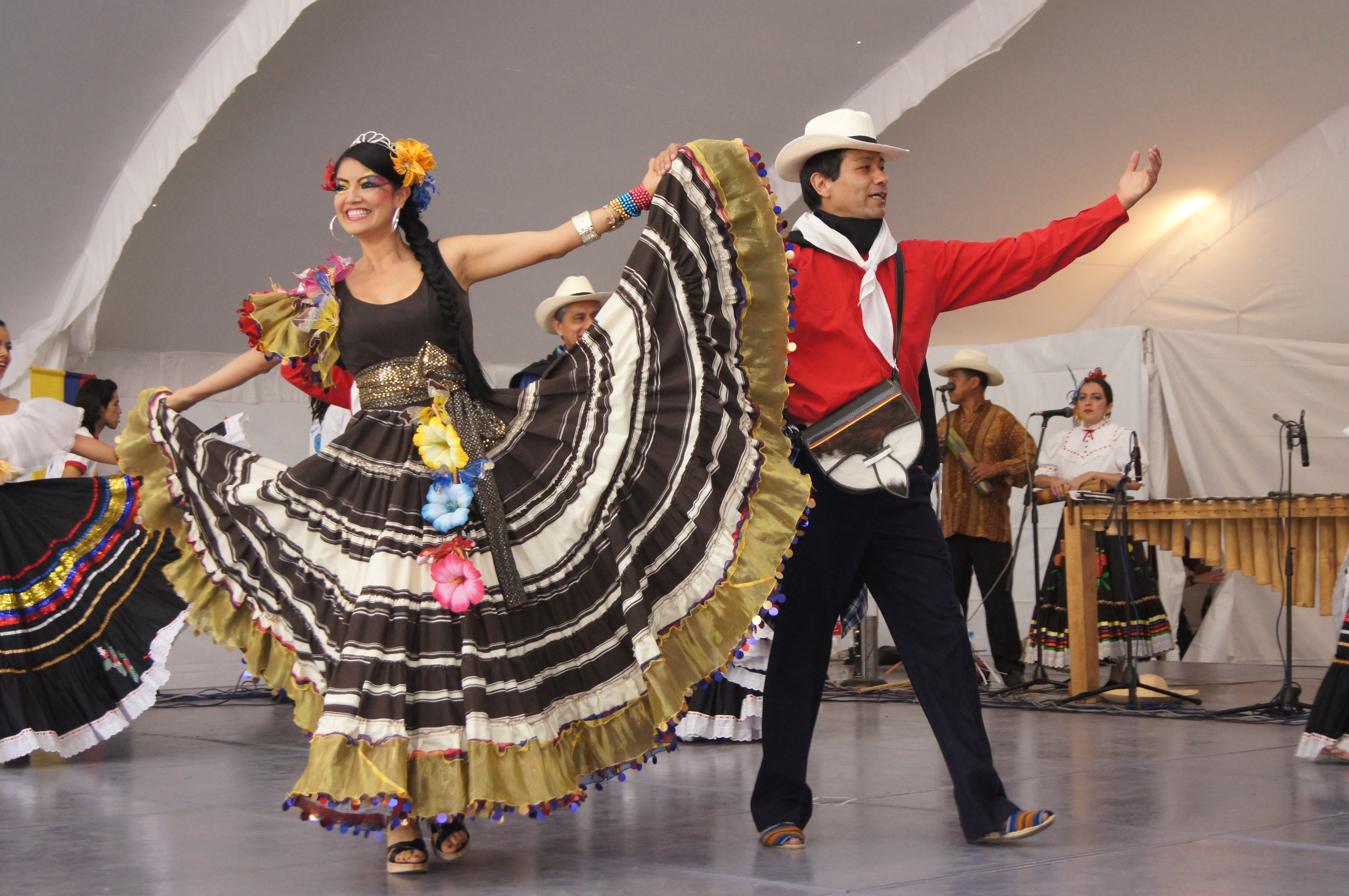 Demonstración de baile folclórico de Colombia durante el evento “Yo Amo Colombia” en ITESM Campus Ciudad de México [1]